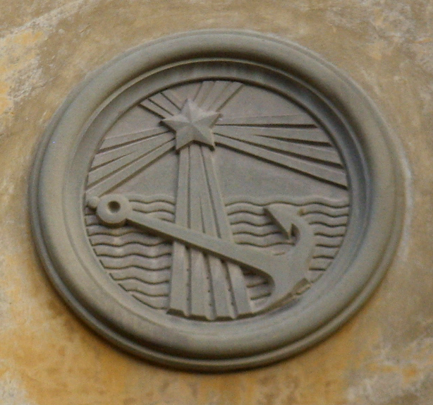 Casa del mutilato firenze medaglione 07